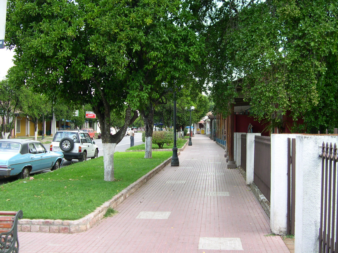 Foto del centro de Villa Alegre, Séptima Región del Maule, Chile.